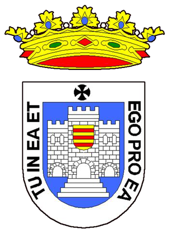 Escudo Montemayor